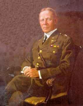 Brig. Gen. Carl Rogers Darnall